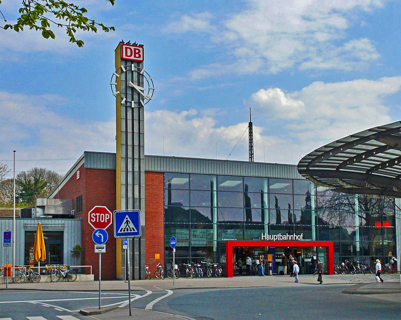 Северный Рейн - Вестфалия, Реклингхаузен. Главный железнодорожный вокзал